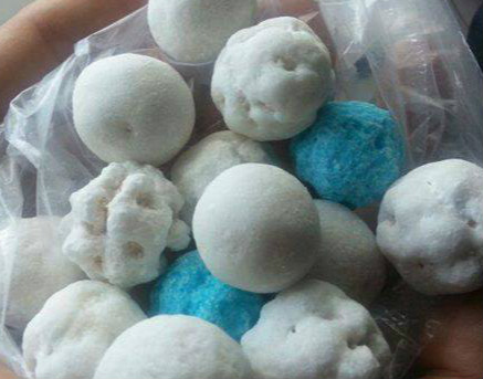 Chochos